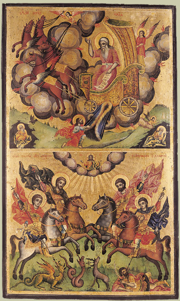 Пророк Илия. Свв. Вмчч. Георгий Победоносец, Феодор Тирон, Феодор Стратилат, Димитрий Солунский. Болгария. 1856. Зограф Захари Цанюв от Трявна. Из ц. Рождества Христова в с. Арбанаси. Великое Тырново. Галерея Фото Православного Форума Апостола Андрея Первоз